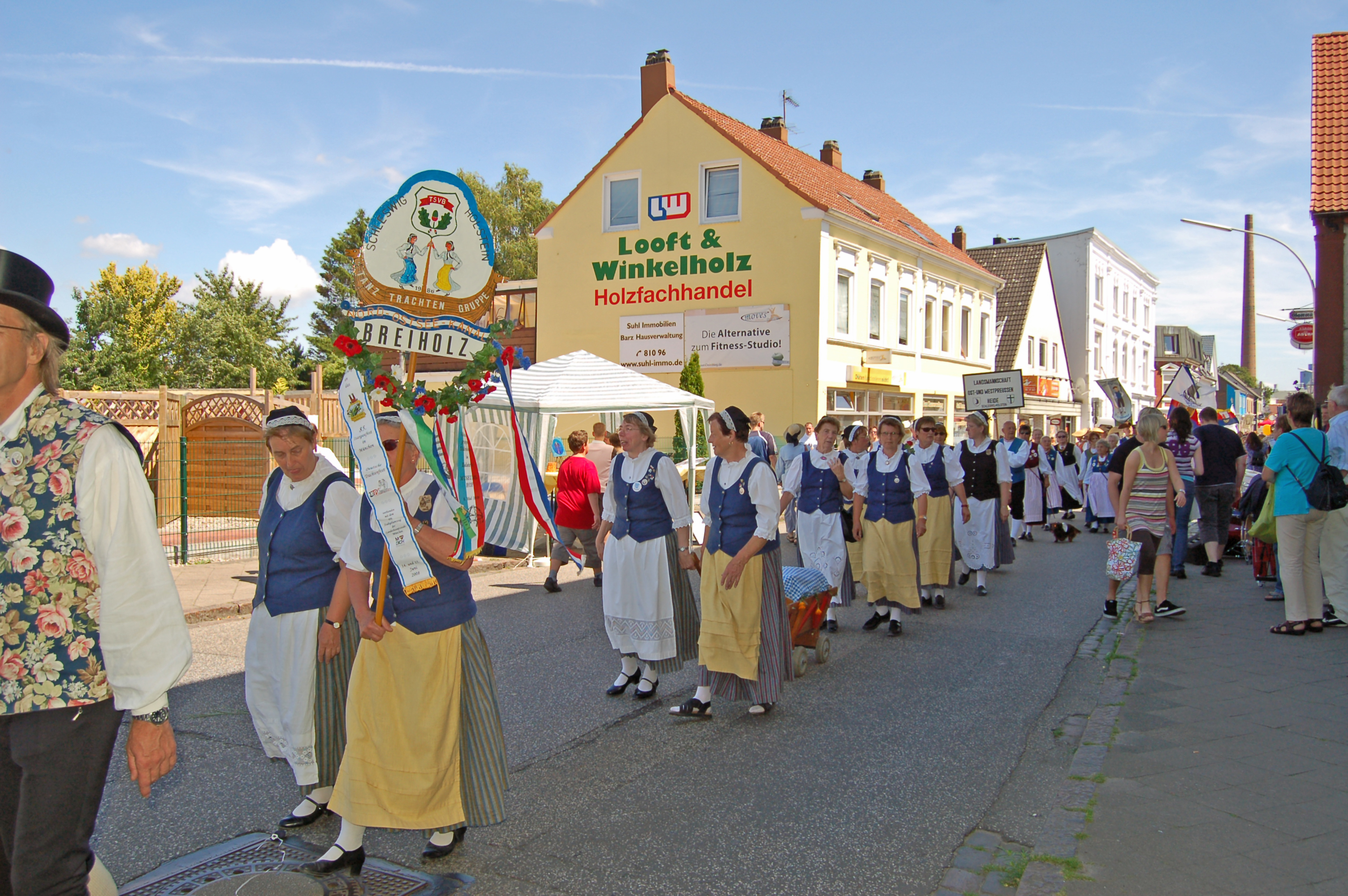 Festumzug der Trachtengruppen mit der Trachtengruppe aus Breiholz durch Uetersen während des Schleswig-Holteinischen Landestrachtenfest 2009. Das Trachtenfest fand anlässlich der 775-Jahr-Feier in Uetersen statt